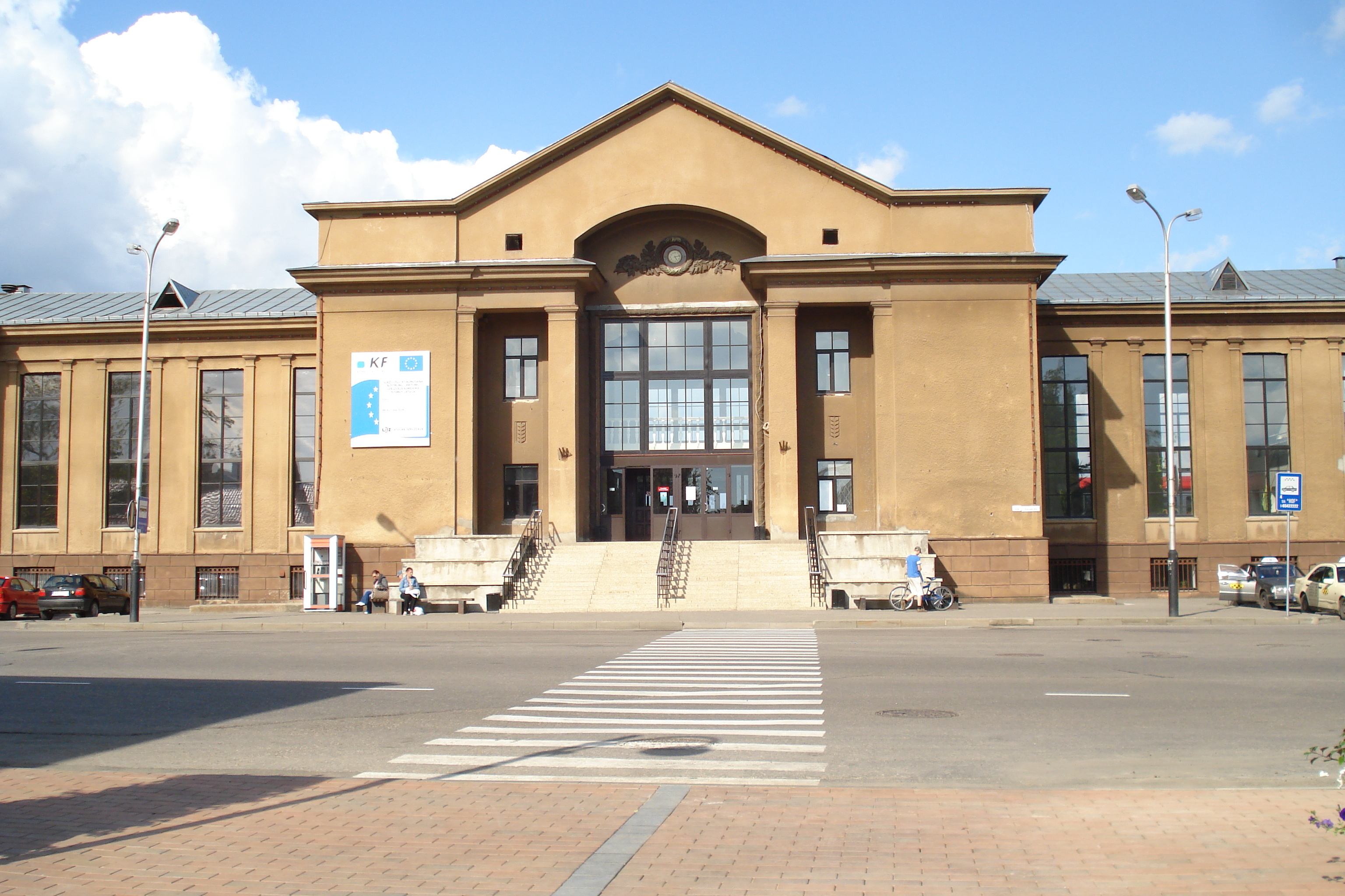 Railway station of Daugavpils city. Железнодорожный вокзал станции Даугавпилс (1951)